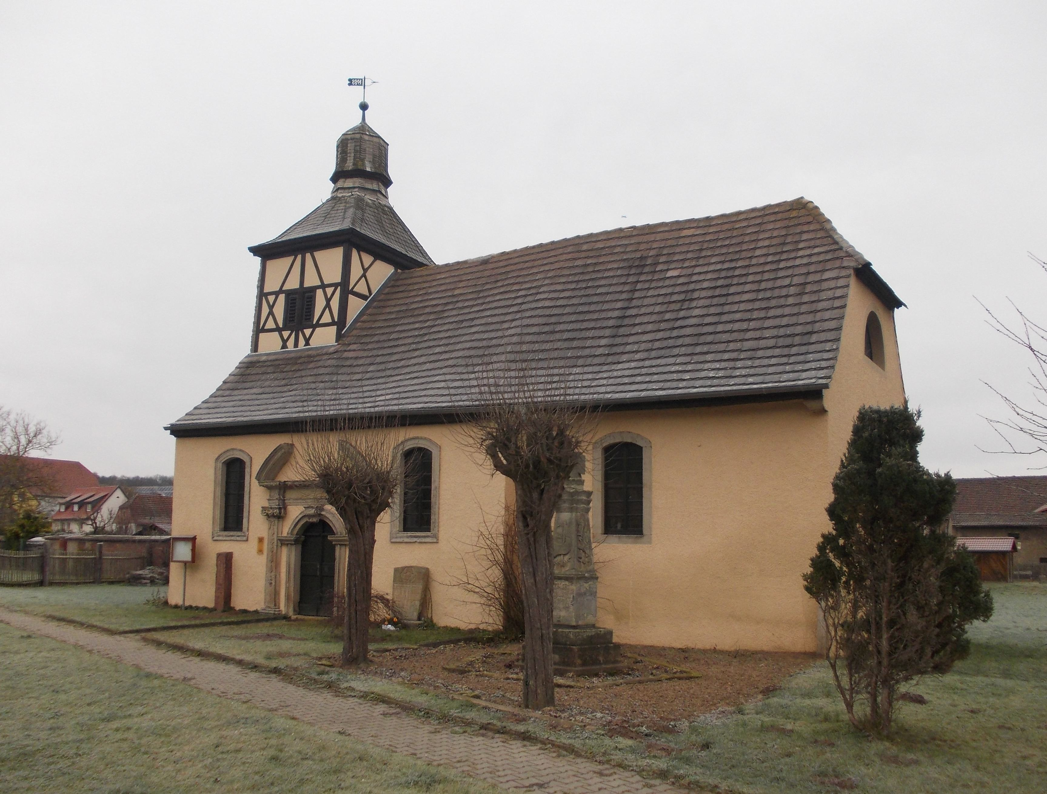 Kirche Unser Lieben Frauen in Tröbsdorf (Stadt Laucha an der Unstrut)